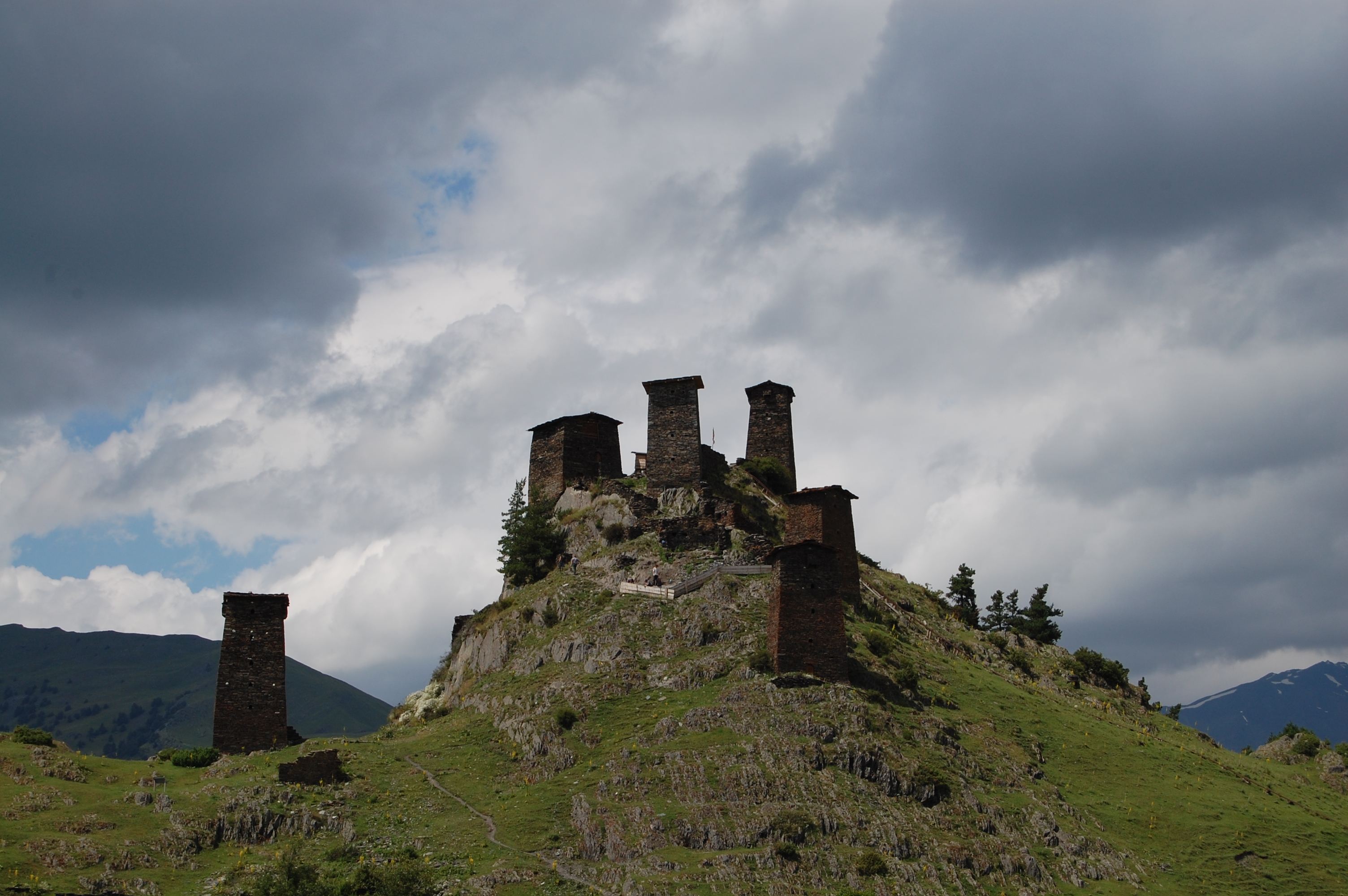 Tusheti - Omalo Georgia - Sakartvelo